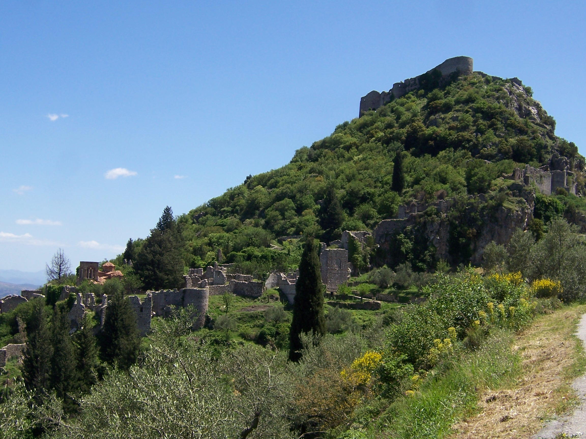 Vue générale de Mistra, depuis la route menant à la porte de la citadelle